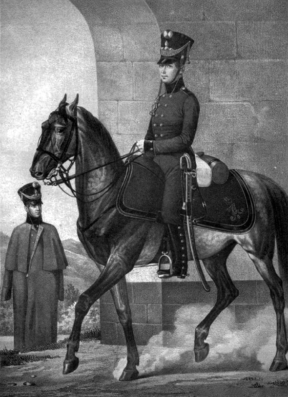 Колонновожатые Свиты Е. И. В. по Квартирмейстерской части, 1810-1811.